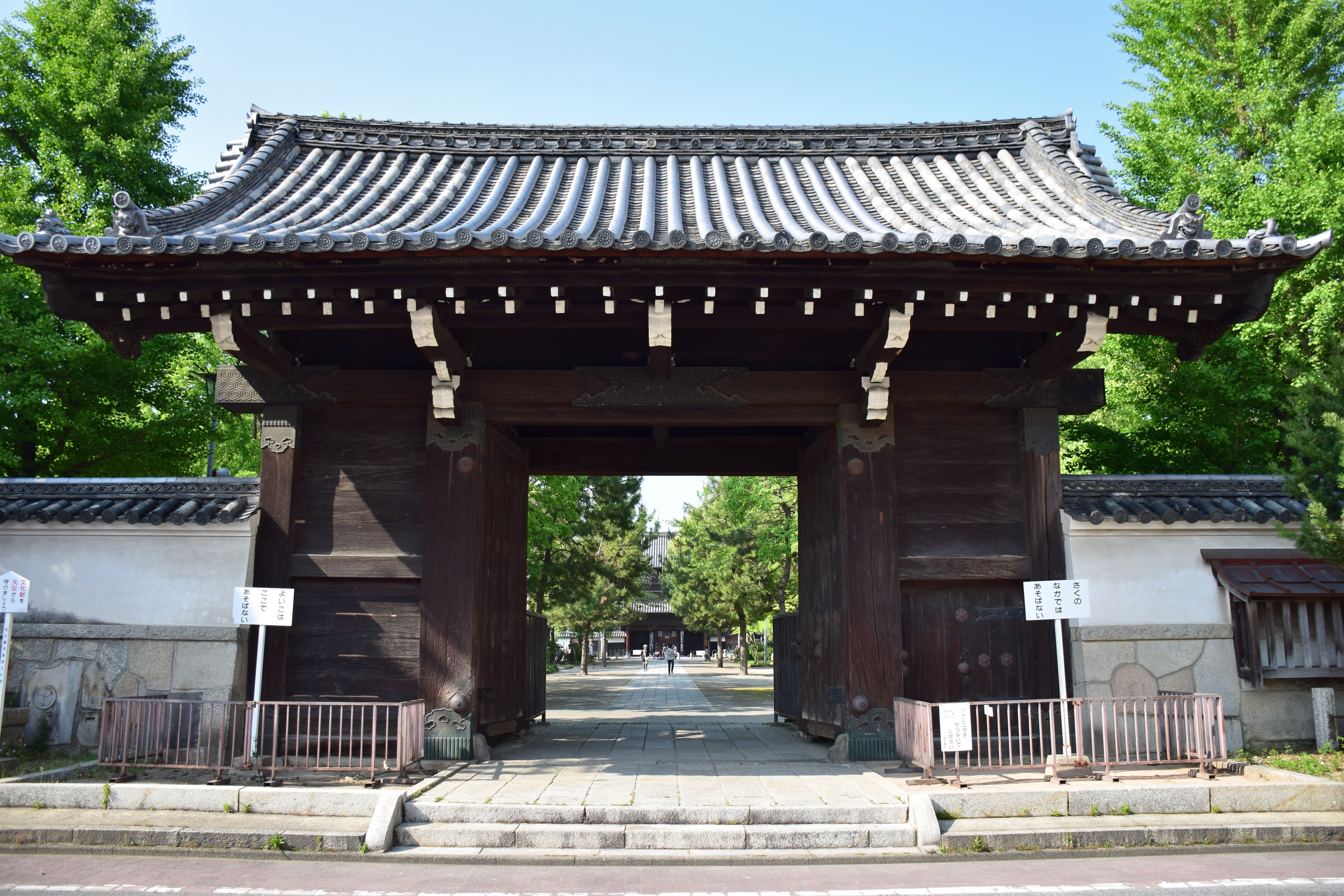 建中寺総門